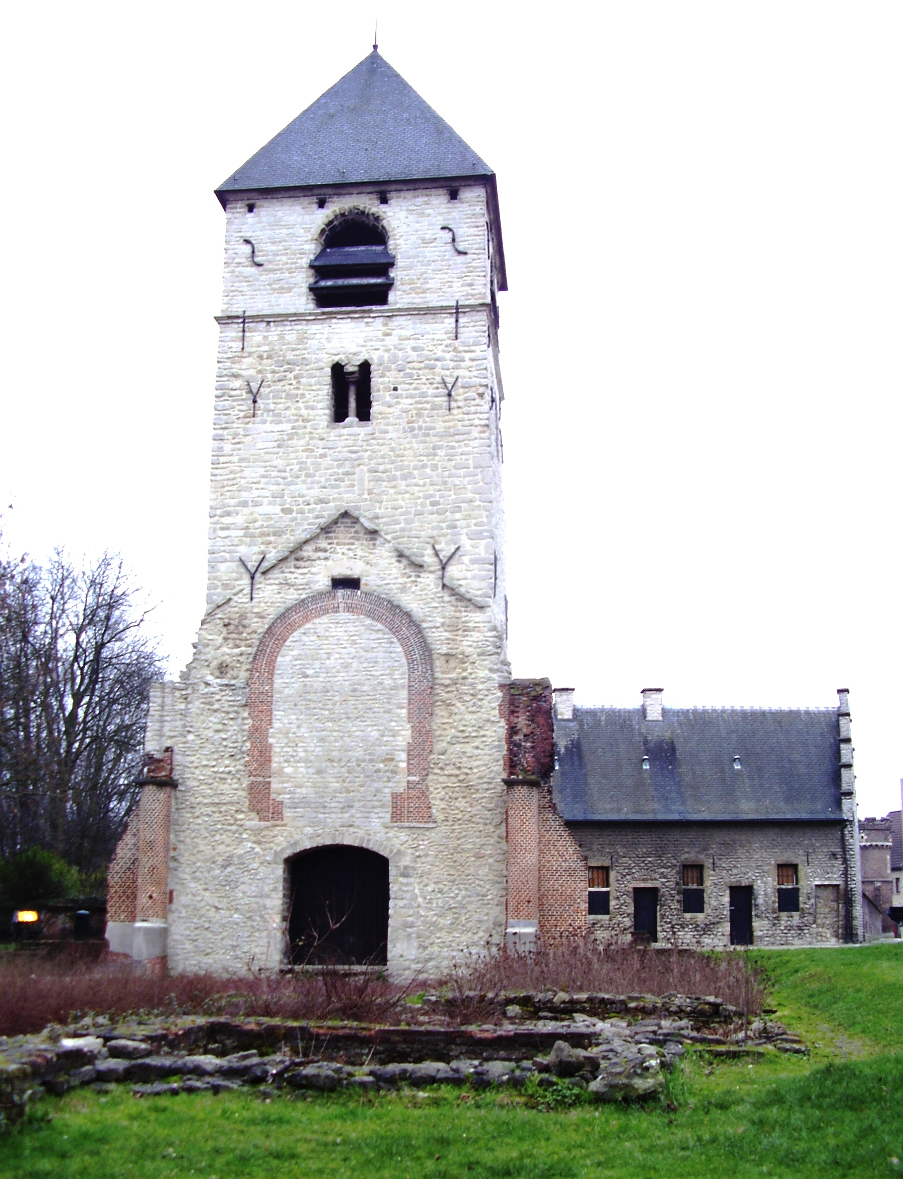 Tour romane de l'ancienne église Saints-Pierre-et-Paul de Nerder-Heembeek à Bruxelles XXIIe siècle. À droite l'ancien hospice (1487)